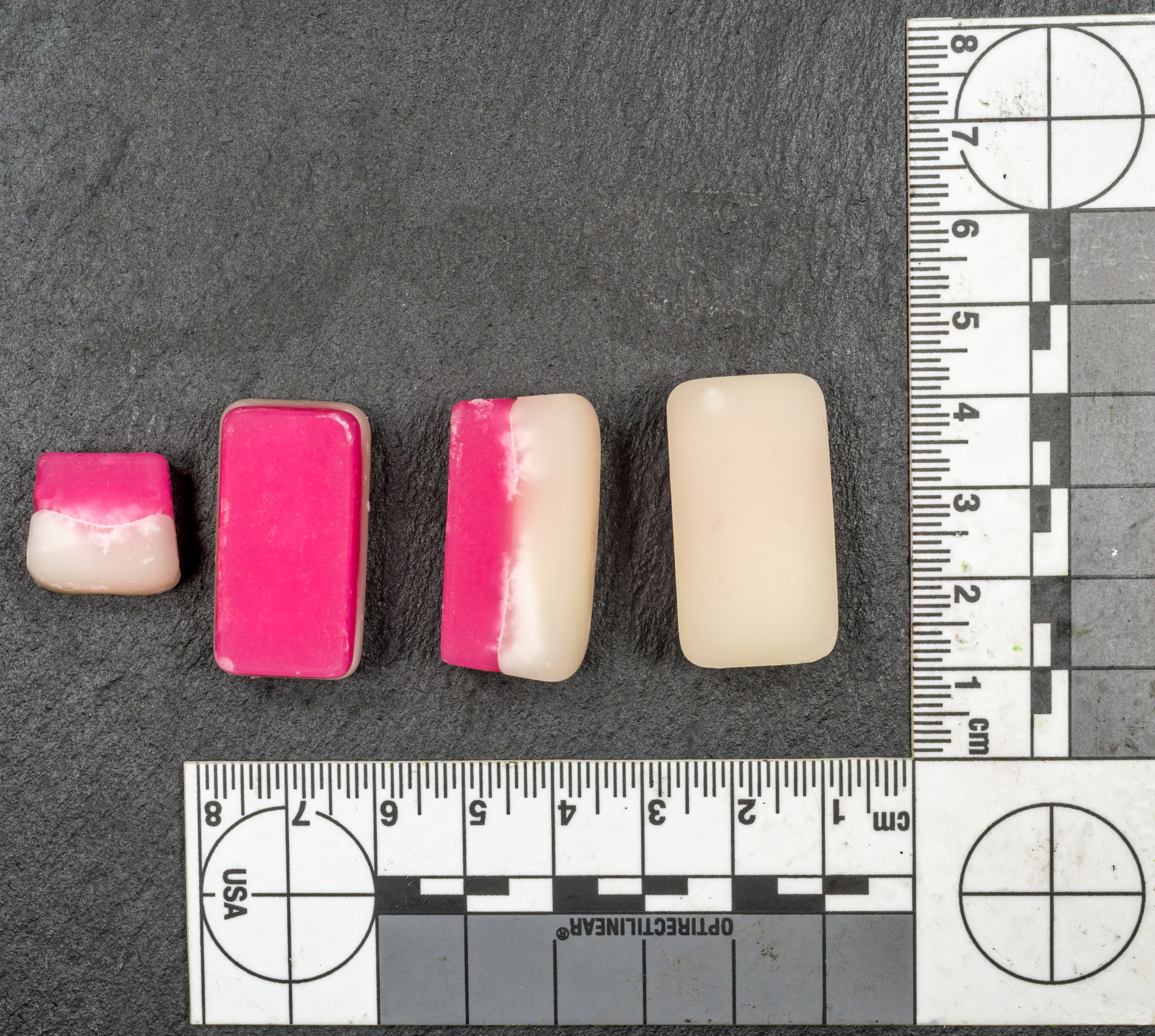 Bonbons Das Bonbon aus Fondant und Pfefferminzöl